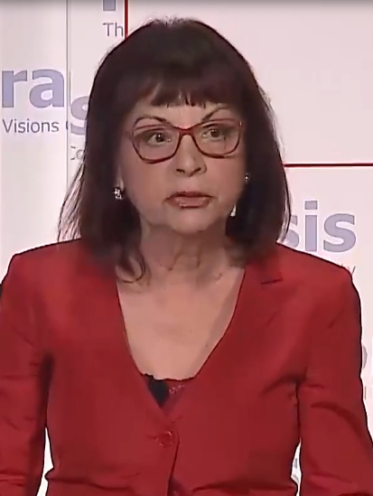 Delegates are invited to participate in the Grand Opening of the 2018 Horasis Global Meeting, one of the world’s foremost annual gatherings of business leaders who interact with government and thought leaders.